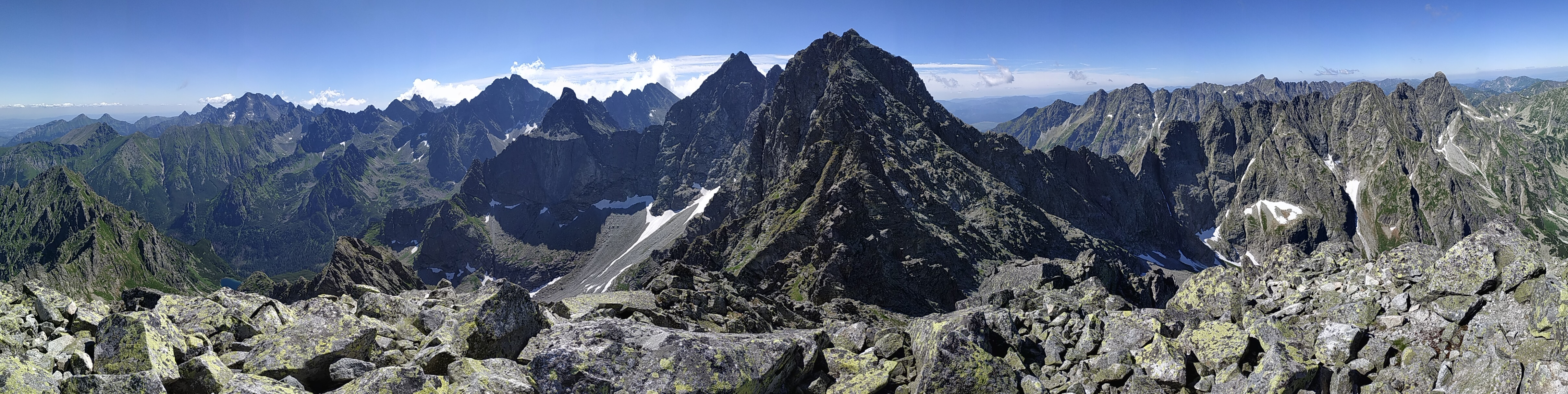 Widok z Niżnych Rysów